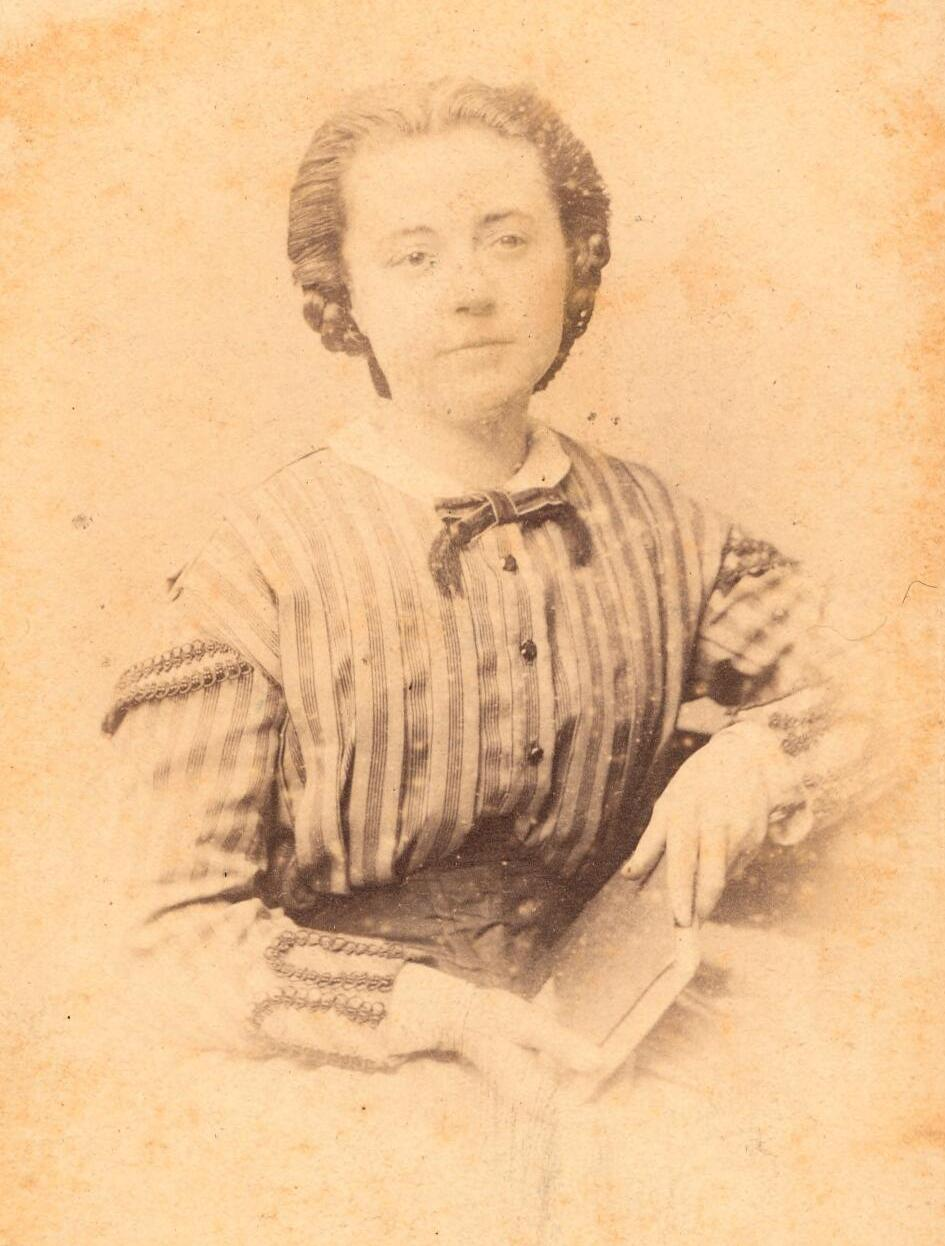 Hendrina Hermina Scholten-Commelin